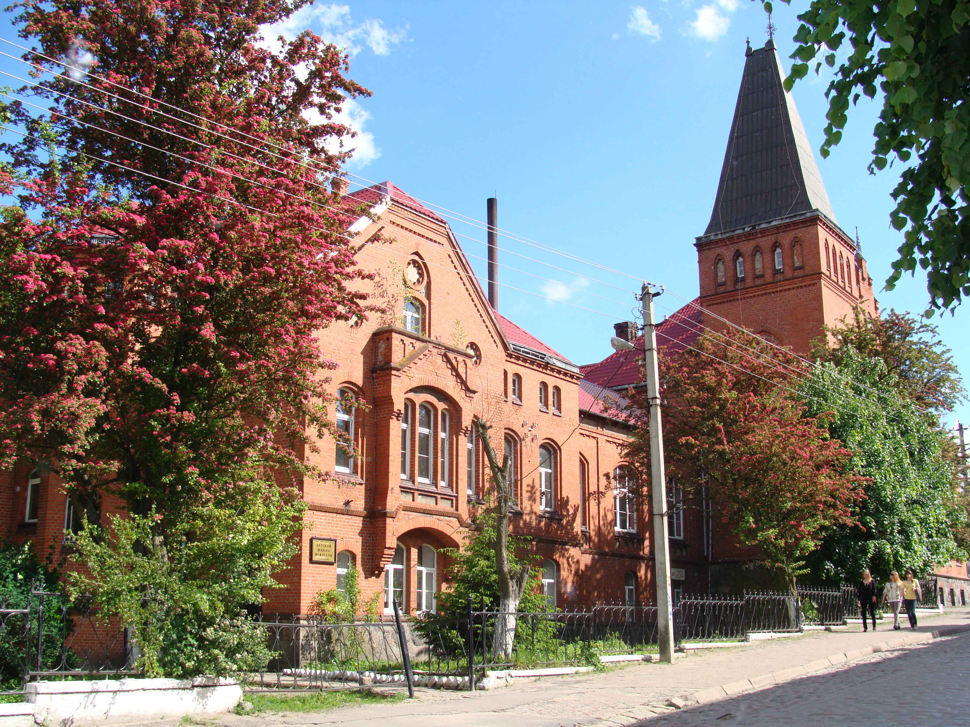 Фотография сделана 05.06.2010 в Багратионовске (Калининградская область). Памятник немецкой архитектуры XIX века. До второй мировой войны - бывшее районное управление (Прейсиш-Эйлау, Германия). Ныне - культурно-досуговый центр, детская школа икусств и музей истории края (Багратионовск, Россия).